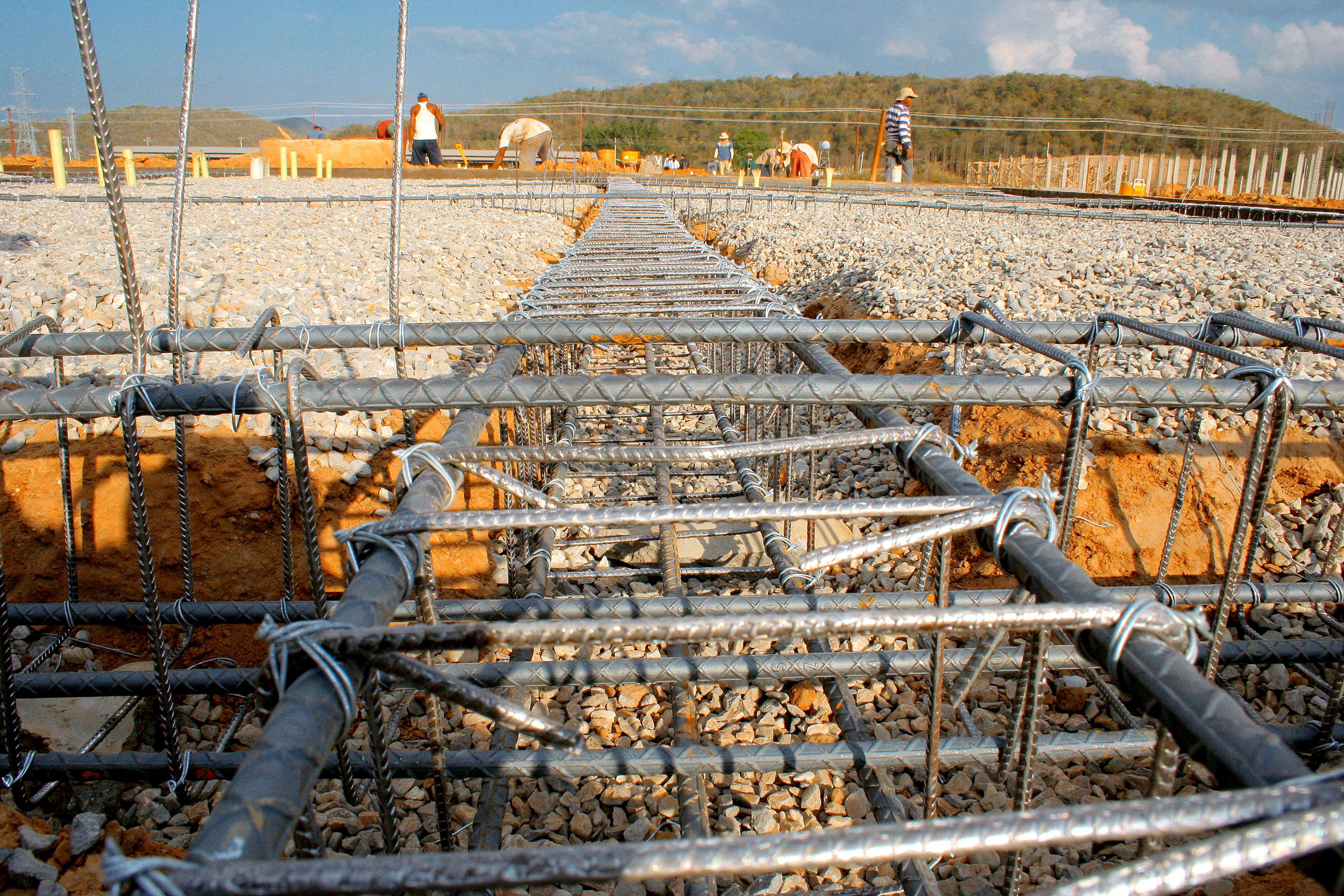 construcción en las afuera de Barquisimeto, Lara Venezuela Construction in the outside of Barquisimeto, Venezuela